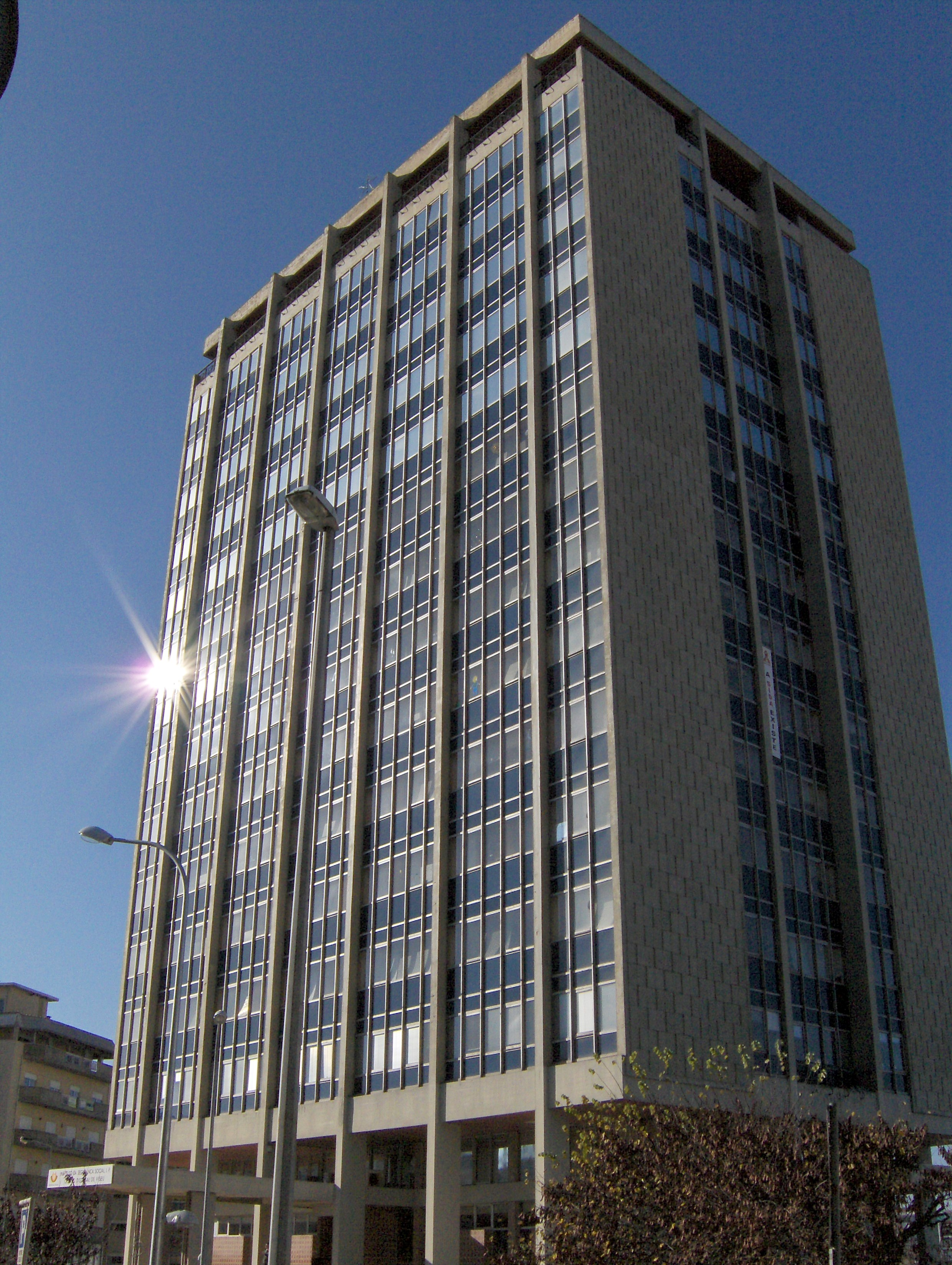 Prédio da Segurança Social, Viseu